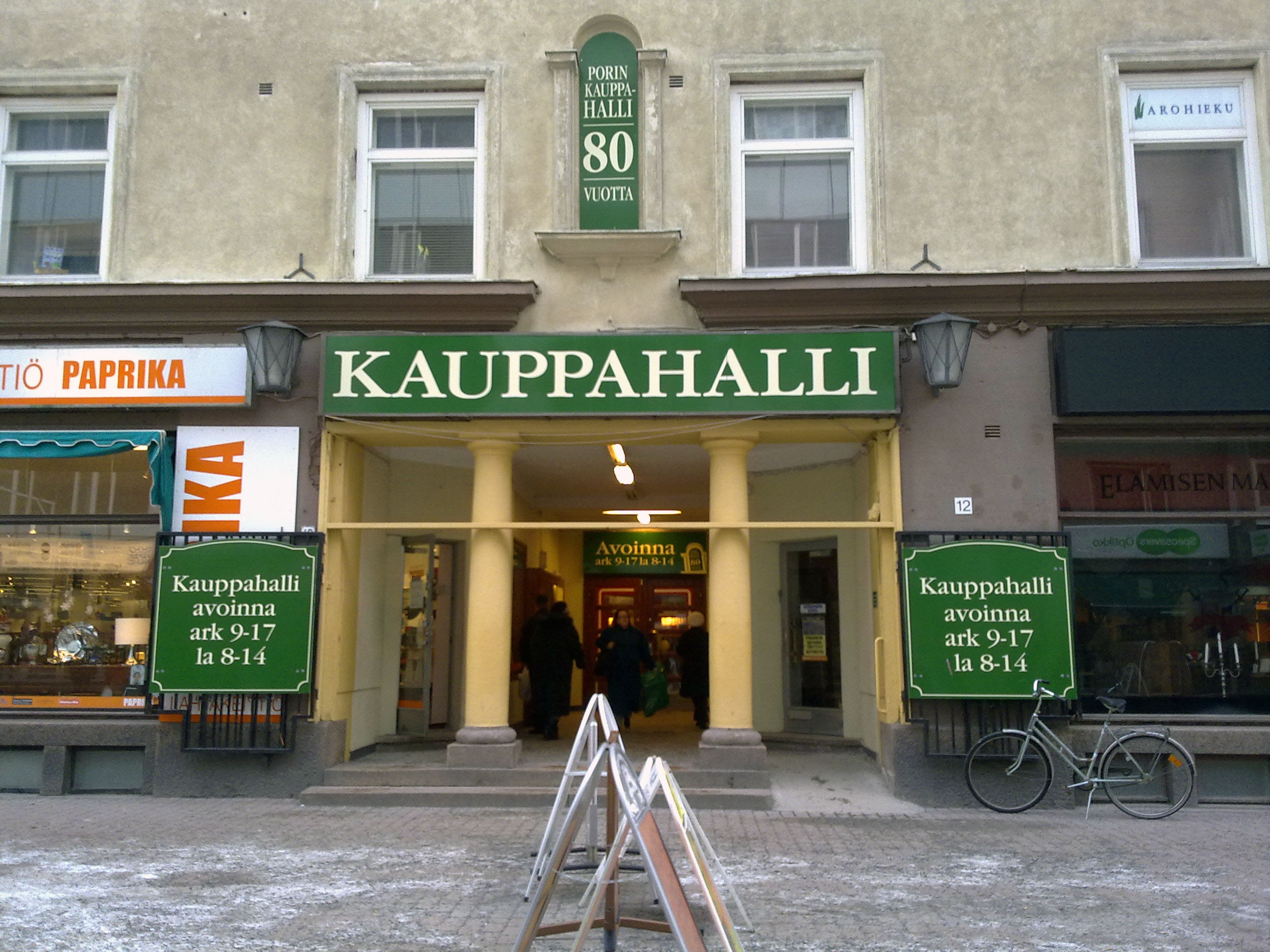 Porin kauppahallin kävelykadun puoleinen sisäänkäynti.